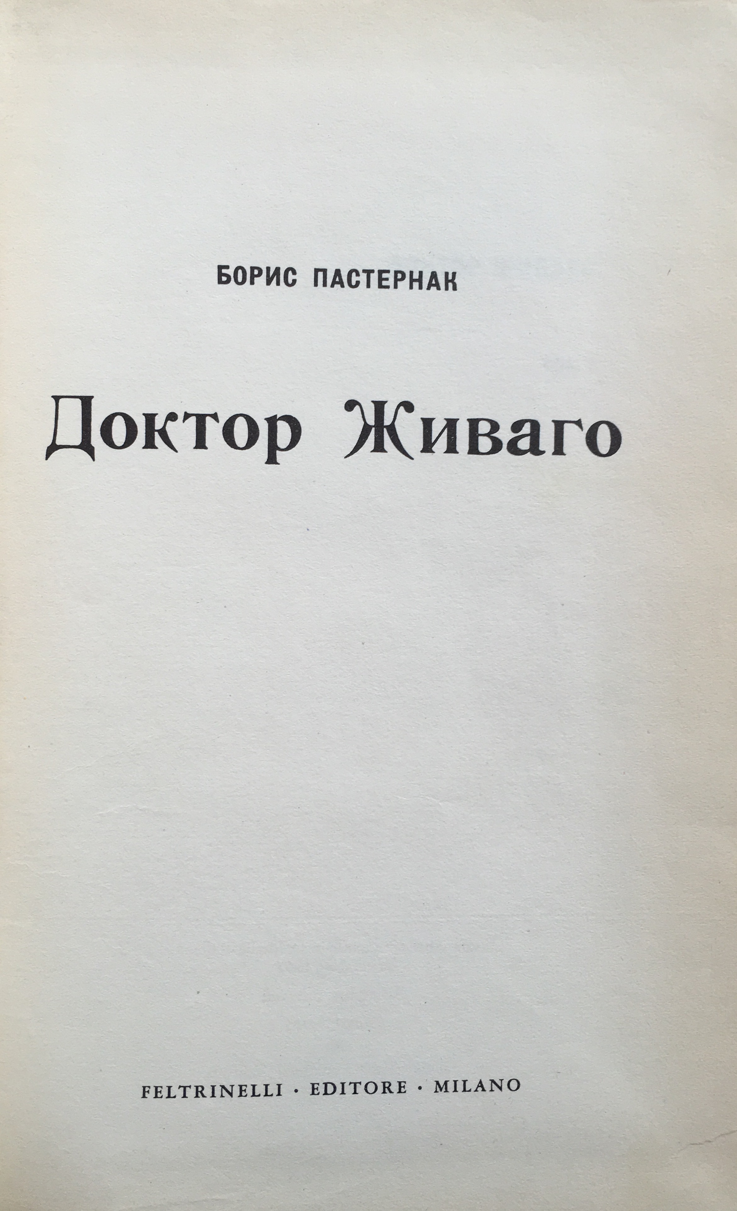 Титульный лист русского издания, издательство Фельтринелли